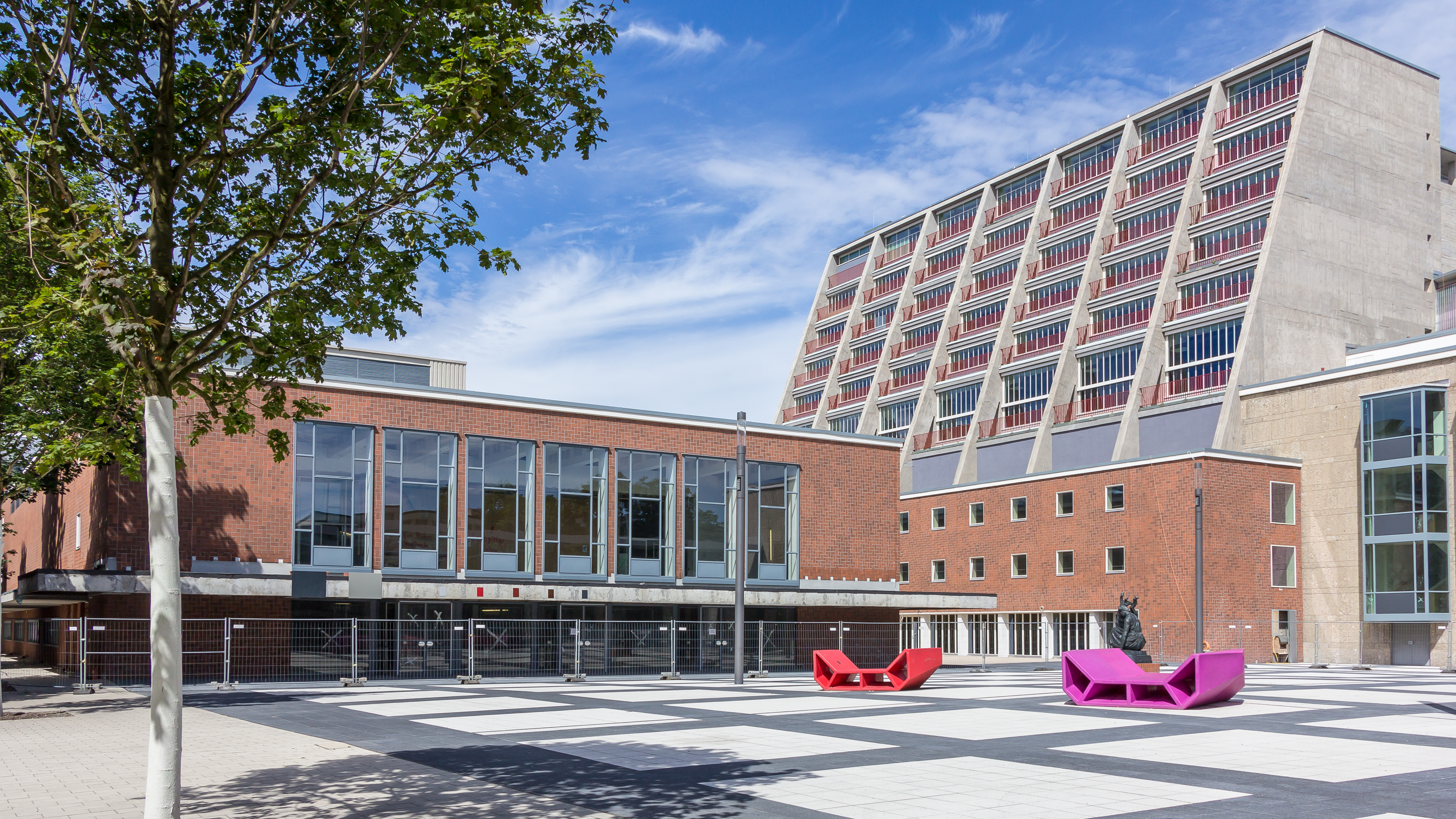 Schauspielhaus Köln und Oper Köln, Ansicht Kleiner Offenbachplatz. Die Außensanierung ist weitestgehend fertiggestellt, die originale Betonsichtigkeit der Werkstatttürme wiederhergestellt. Innen ruht die Sanierung seit längerem